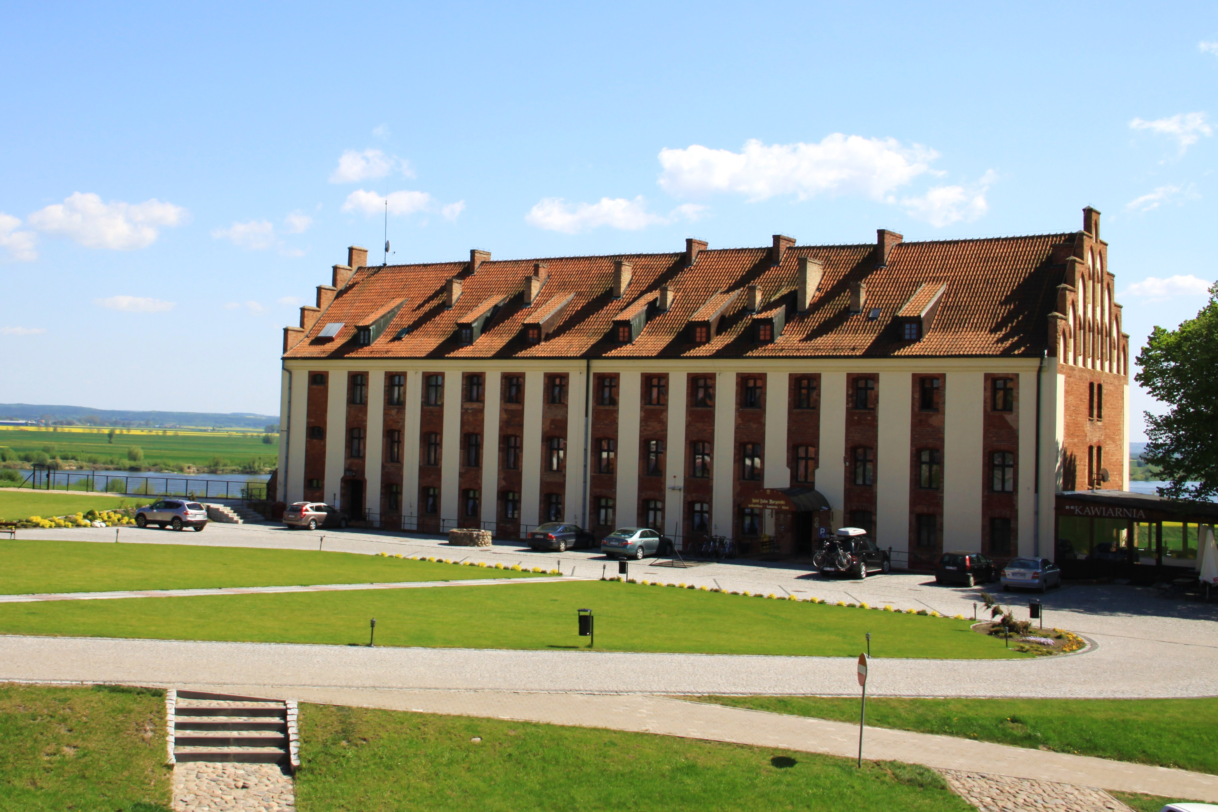 Gniew, pałac Marysieńki, 1674, XIX